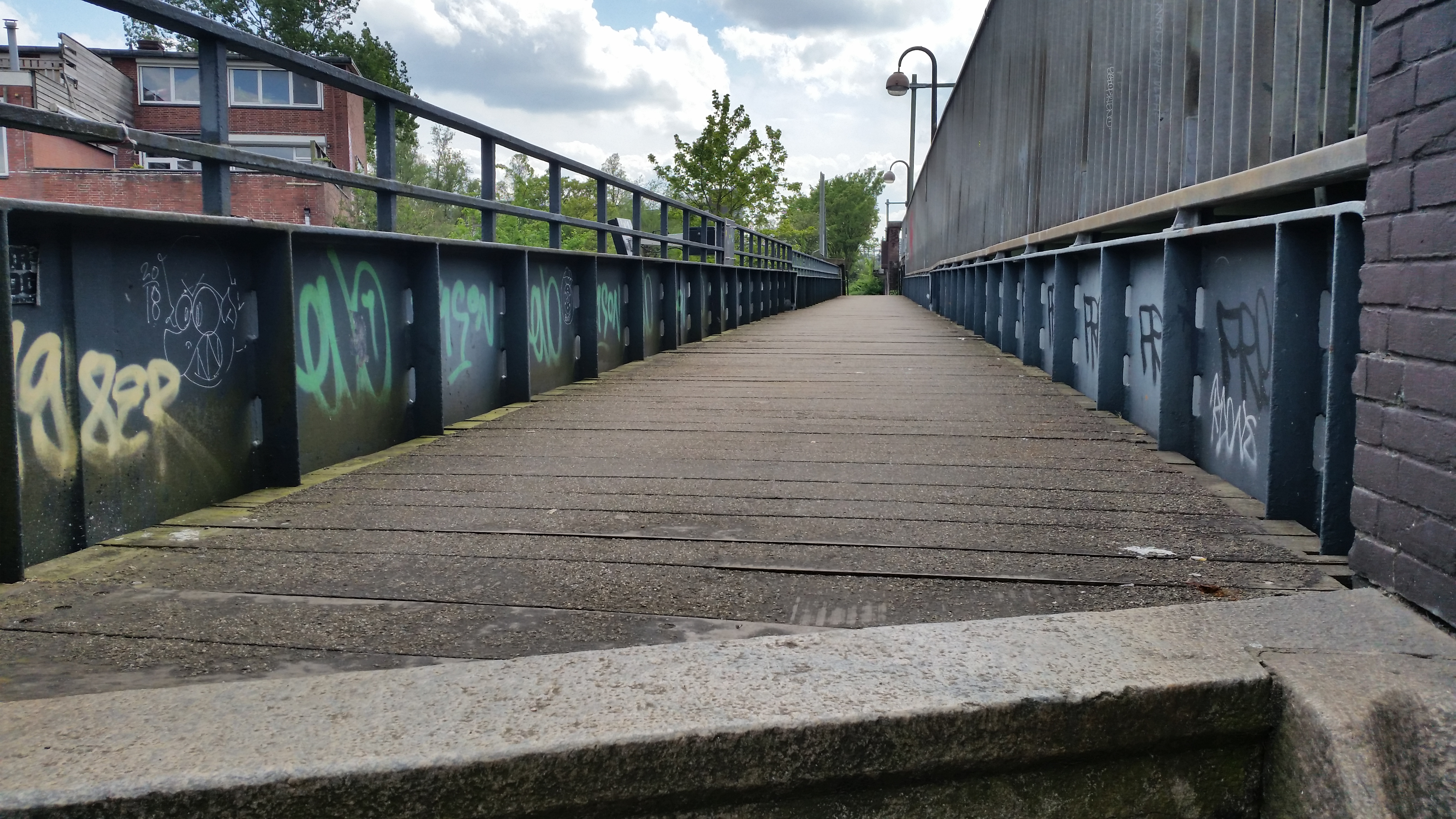 Impressie van voetbrug 332 in Amsterdam-Oost (april 2020)